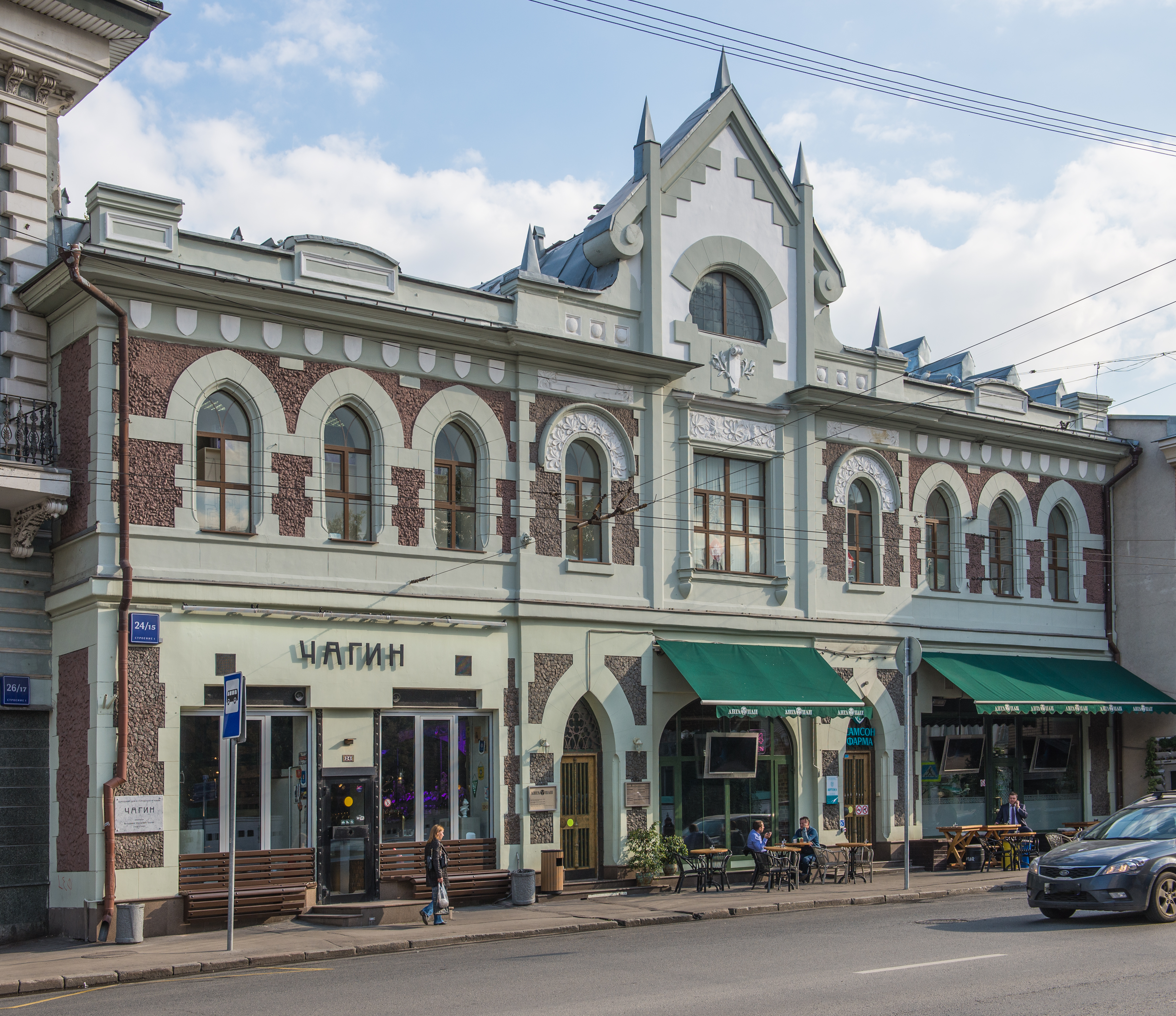 Лубянка Б. ул., дом 24/15, строение 1